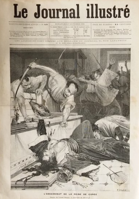 르 주르날 일뤼스트레 을미사변 기사